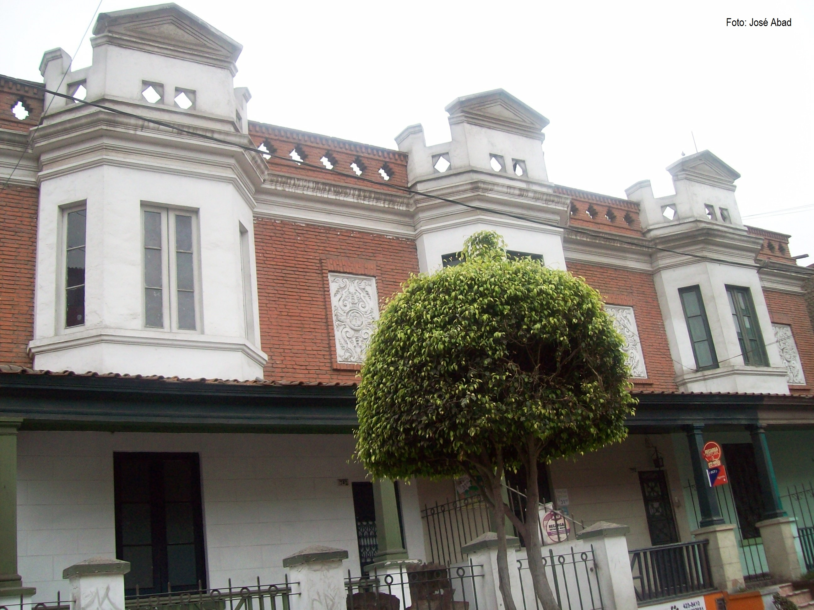 Casona de la séptima cuadra del Jirón Iquique